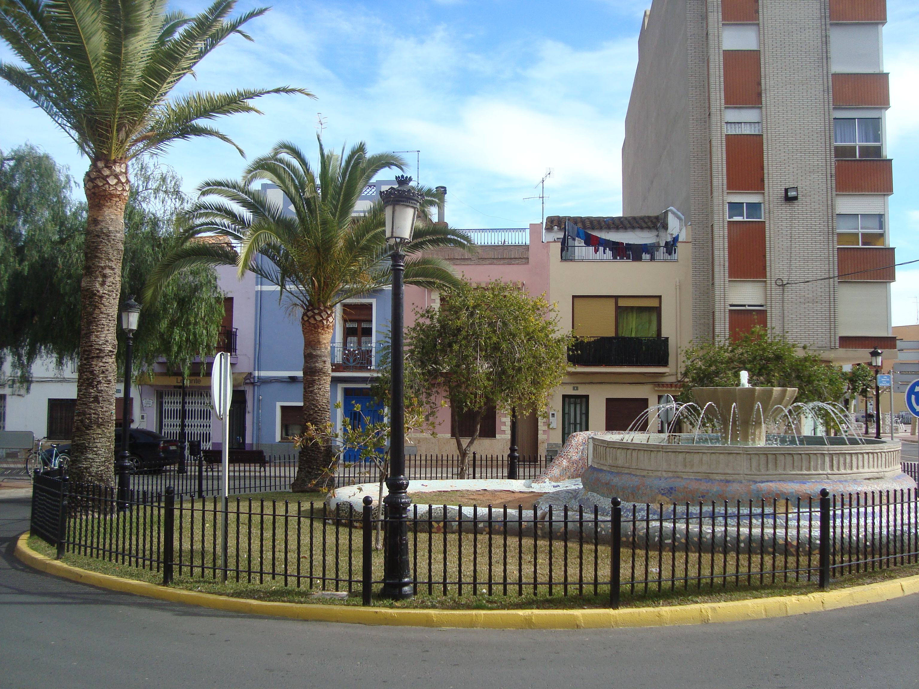 Oropesa del Mar, Castellón